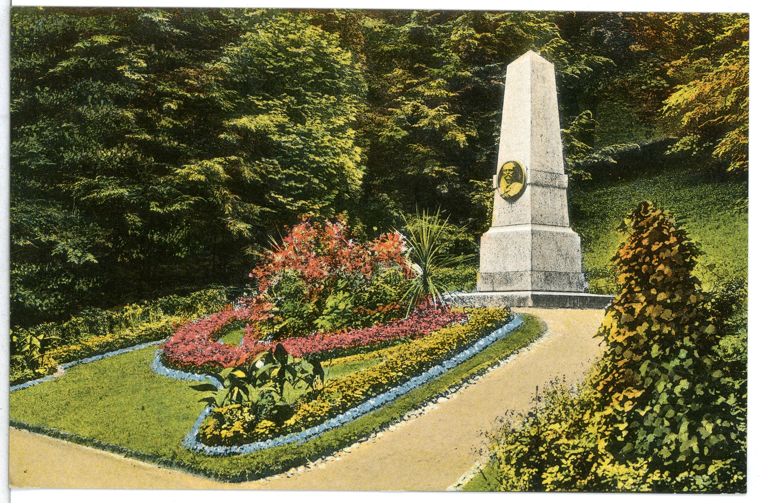 Chemnitz; Claus - Denkmal im Stadtpark This postcard is from publisher Brück & Sohn in Meißen ( postcard has a unique number 12378 and is available in a higher resolution at the publisher. This images was uploaded in a cooperation project between Wikipedians and the publisher.